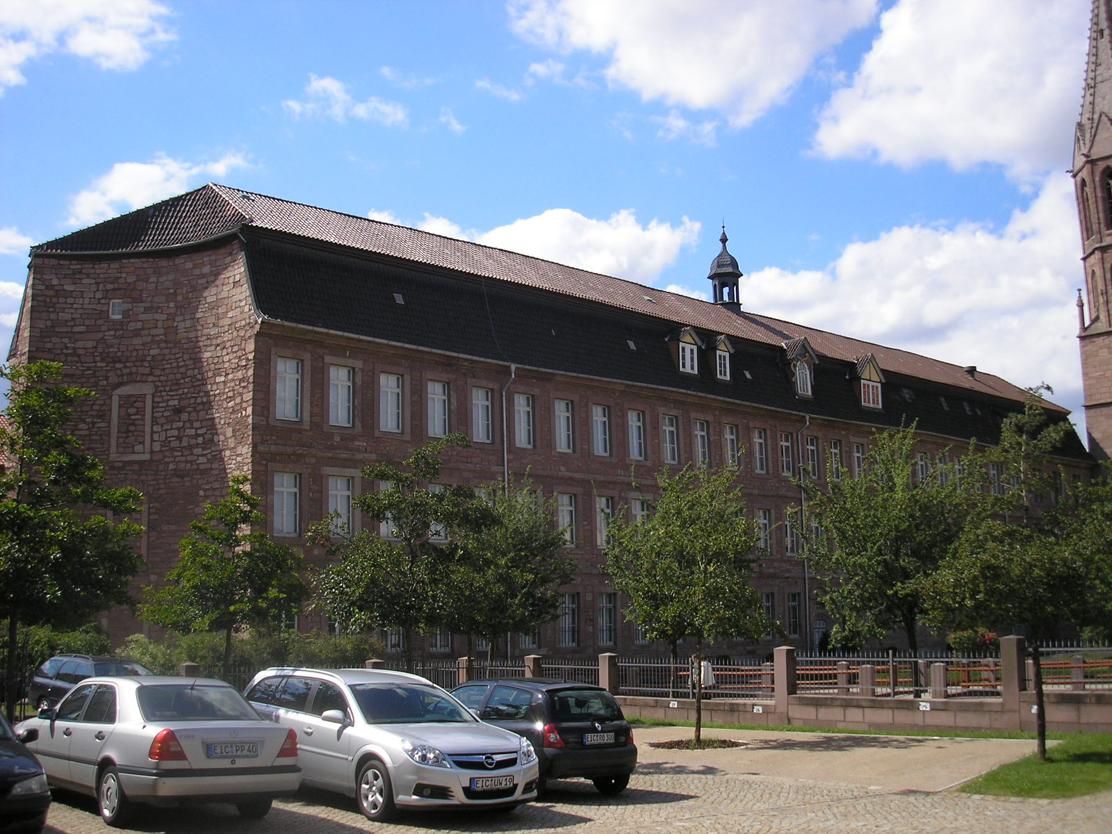 Das Jesuitenkolleg (heute Eichsfeldmuseum) in Heiligenstadt (Thüringen).